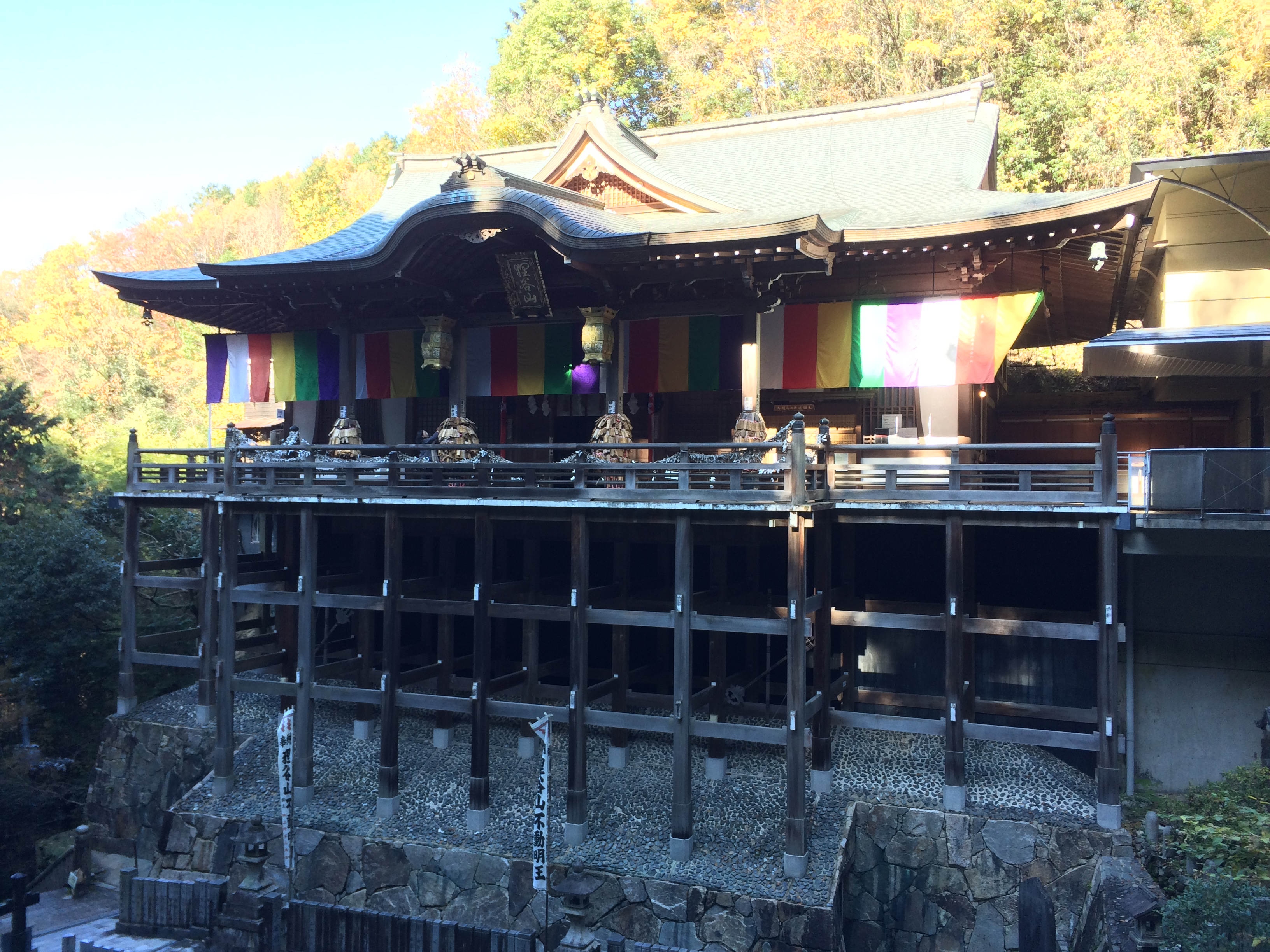 狸谷山不動院本堂